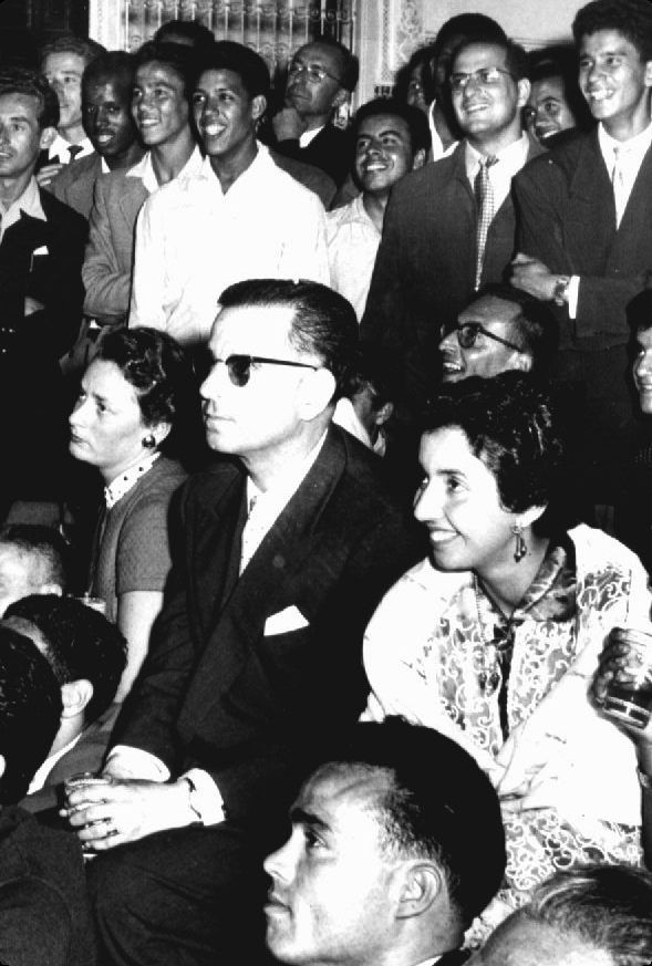 Ahmed Balafrej, photo prise sans doute à Azrou 1957